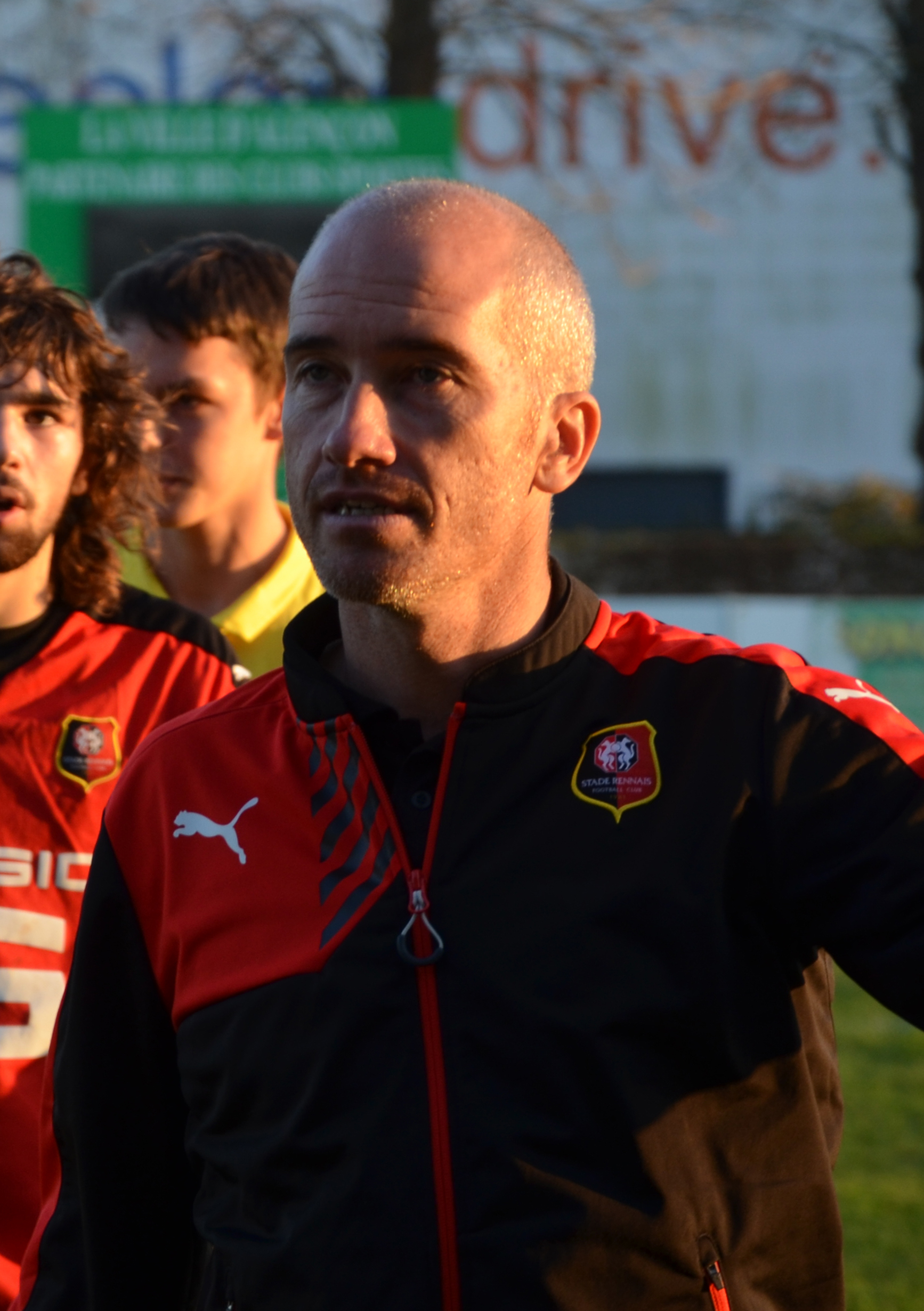 Romain Ferrier entraîneur des moins de 17 ans du Stade rennais, lors d'un match opposant son équipe à l'US Alençon le 8 novembre 2015.